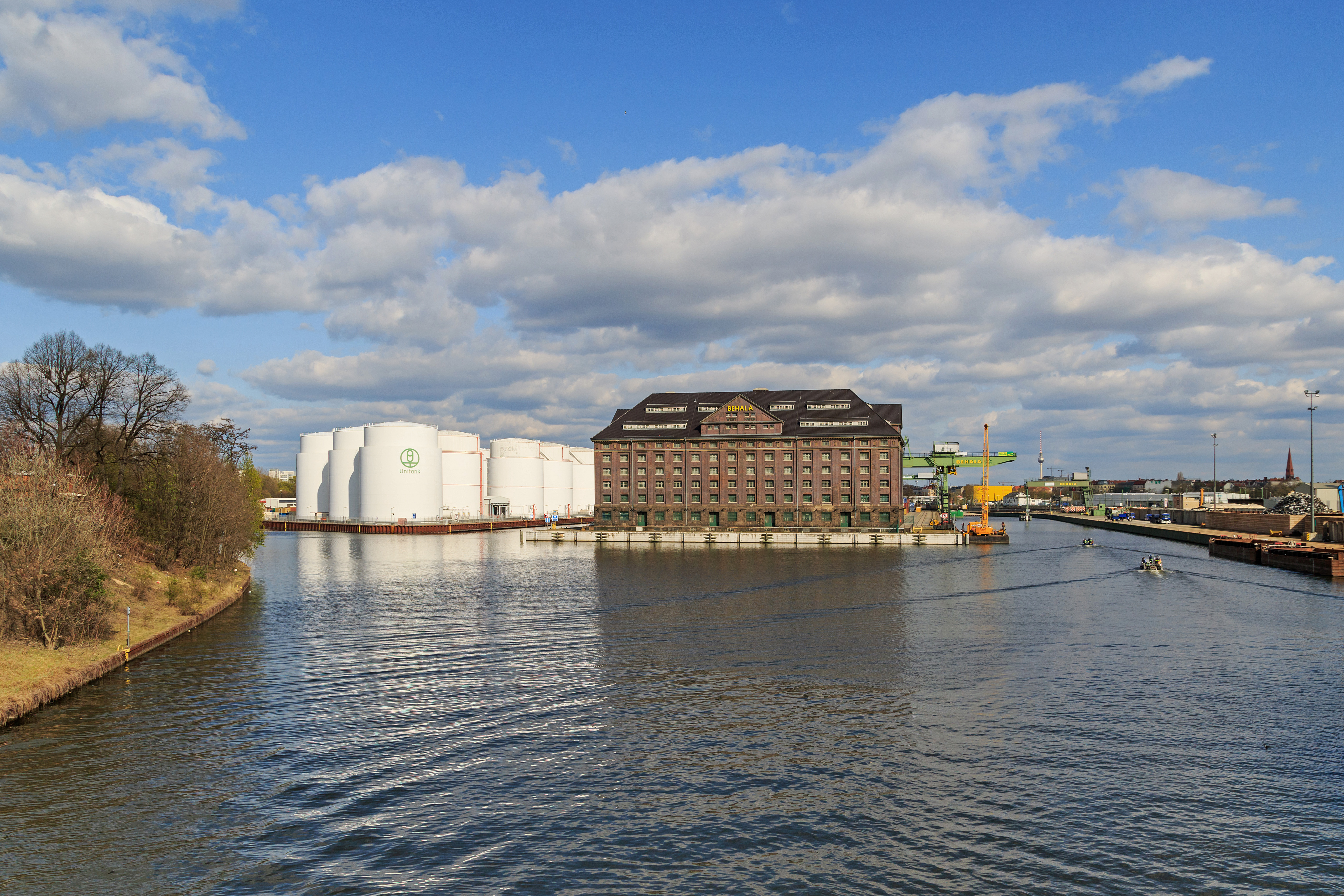 BEHALA Westhafen Berlin: Aussicht von der Beusselstraße